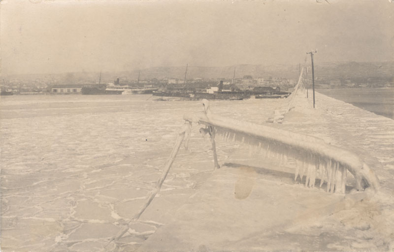 Февруарските студове на 1929 г. през обектива на фотографа Коста Терзистоев. Серия от фотографии, посветена на природната аномалия е отпечатана на страниците на сп. "Морски сговор".